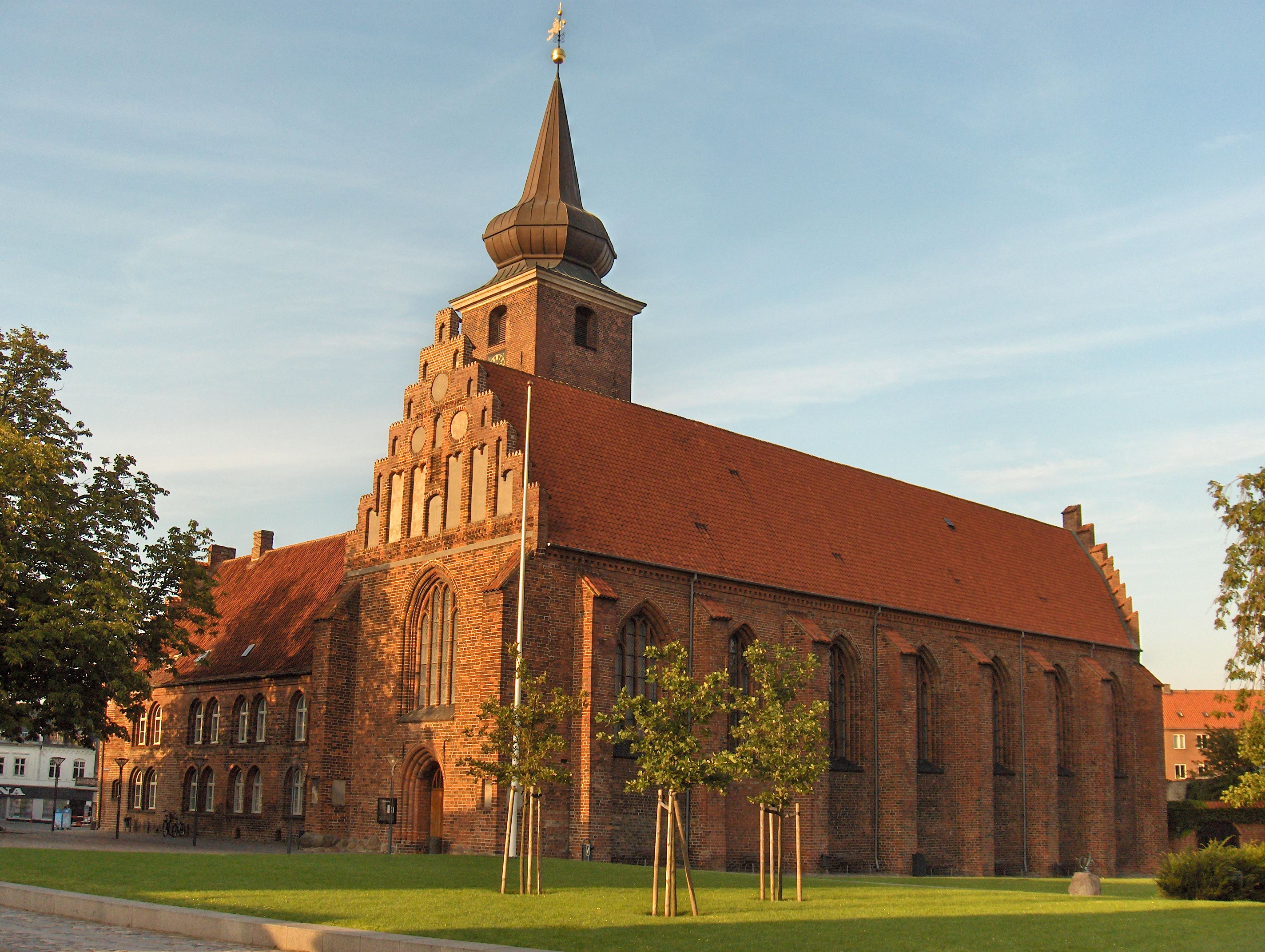 Klosterkirken (Church), Nykobing Falster, Denmark